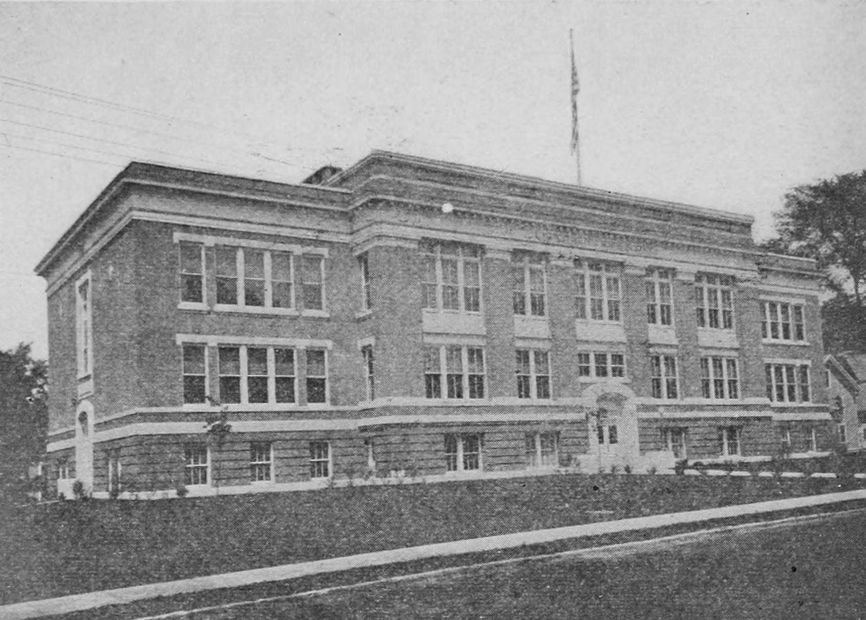 Montpelier High School, Montpelier, Vermont